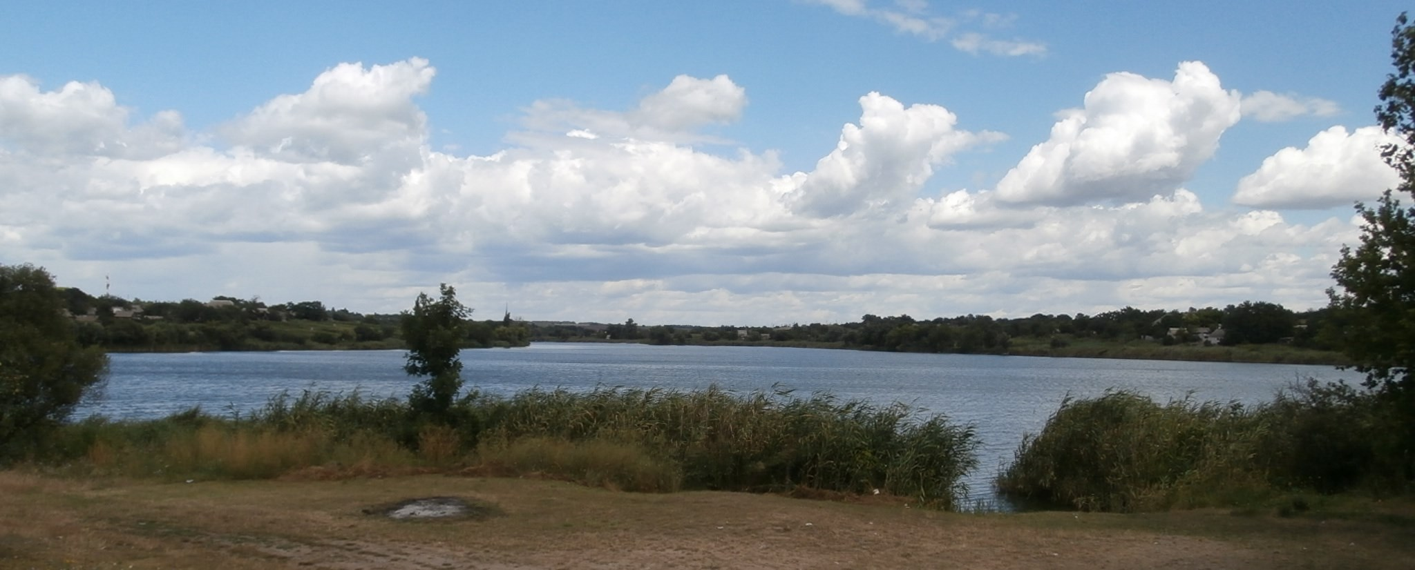 Blick auf Schowte (Pjatychatky)